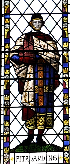 Robert Fitzharding